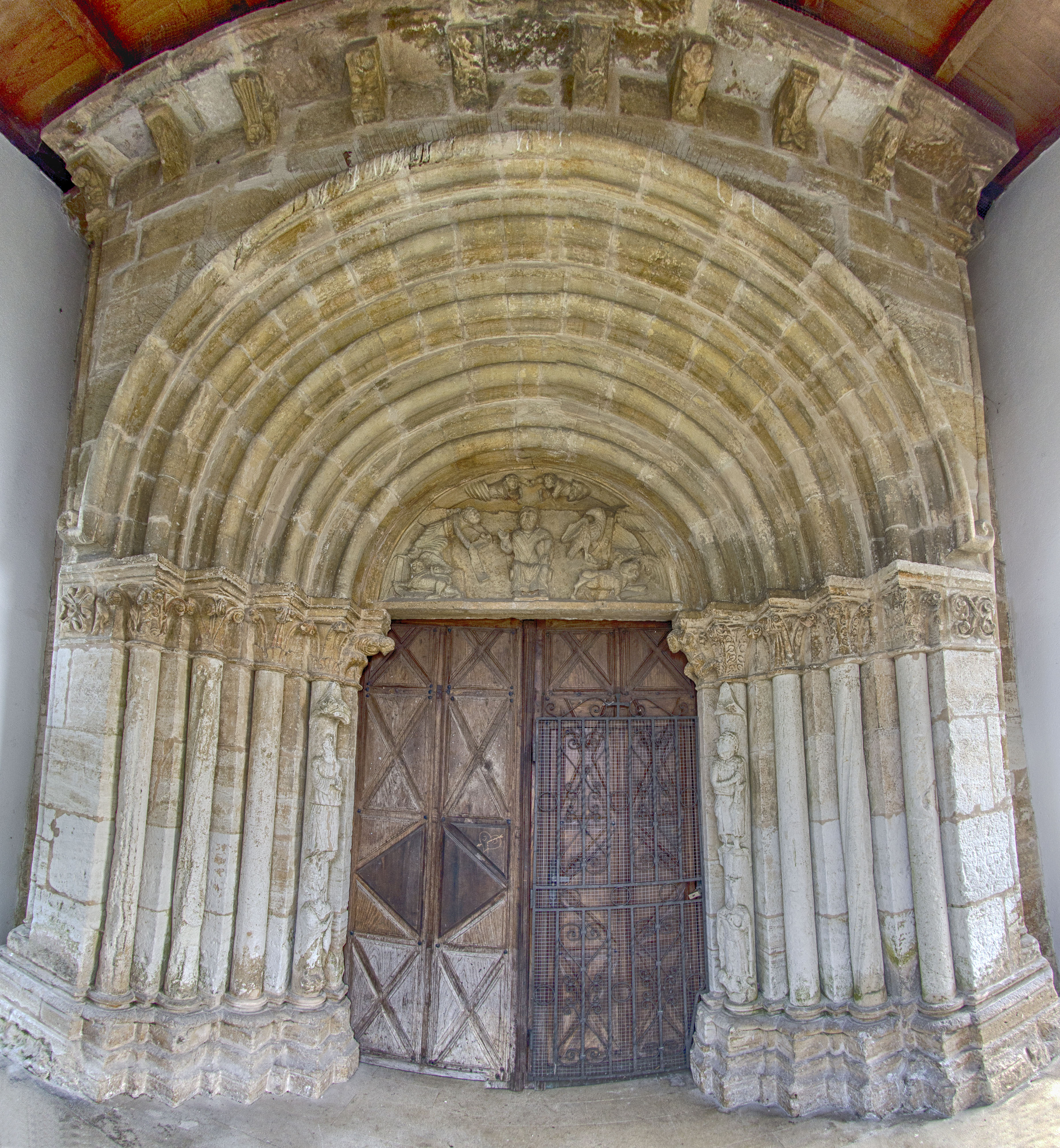 Esta iglesia está en la parroquia de Priorio, concejo de Oviedo, Asturias. Destaca la portada del siglo XII, hoy protegida por un pórtico moderno. El tímpano de la portada es caso único en el románico asturiano. También son interesantes las estatuas sobre las columnas interiores, sobre las que no he encontrado información. La portada fue fotografiada con un objetivo de 10 mm debido a que el pórtico impide su visión desde una distancia mayor. La imagen es un mosaico de tres fotografías.